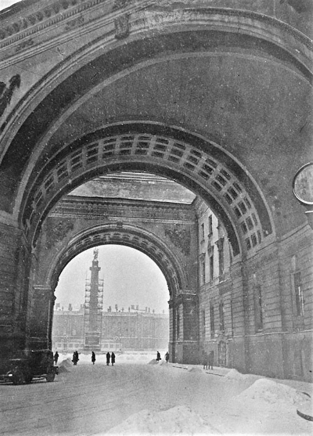 Ленинград. Арка Главного штаба